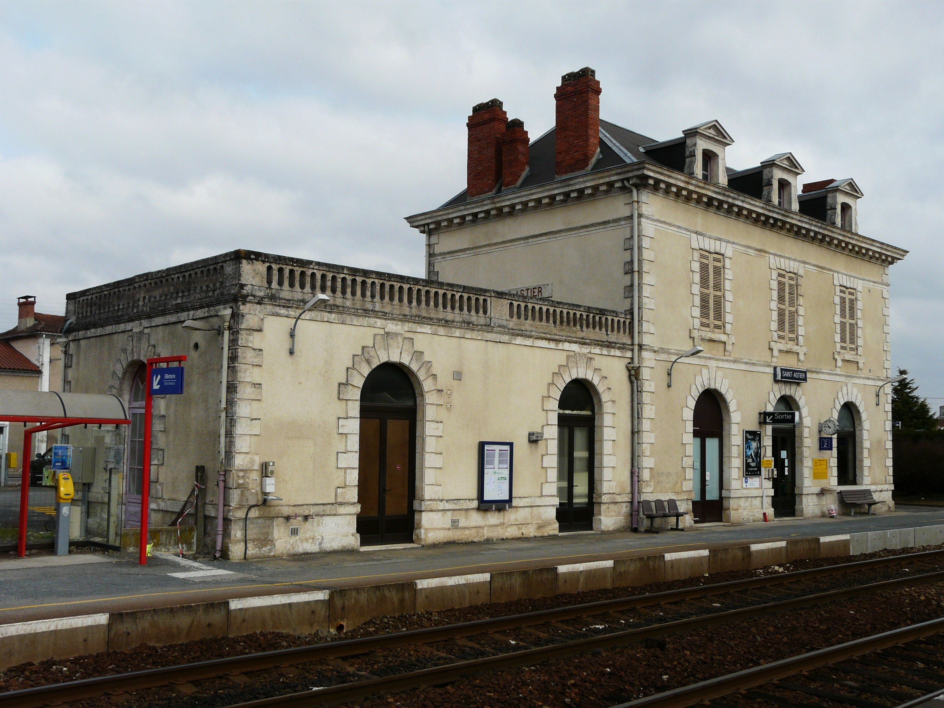 Le bâtiment de la gare de Saint-Astier, Dordogne, France.